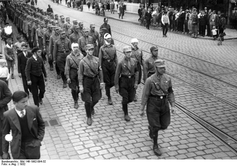 Spandauer S.A. beim Aufmarsch 1932. Im Vordergrunde S.A. Leute, die auf dem Wege zum Treffpunkt des Aufmarschs überfallen und verletzt wurden.